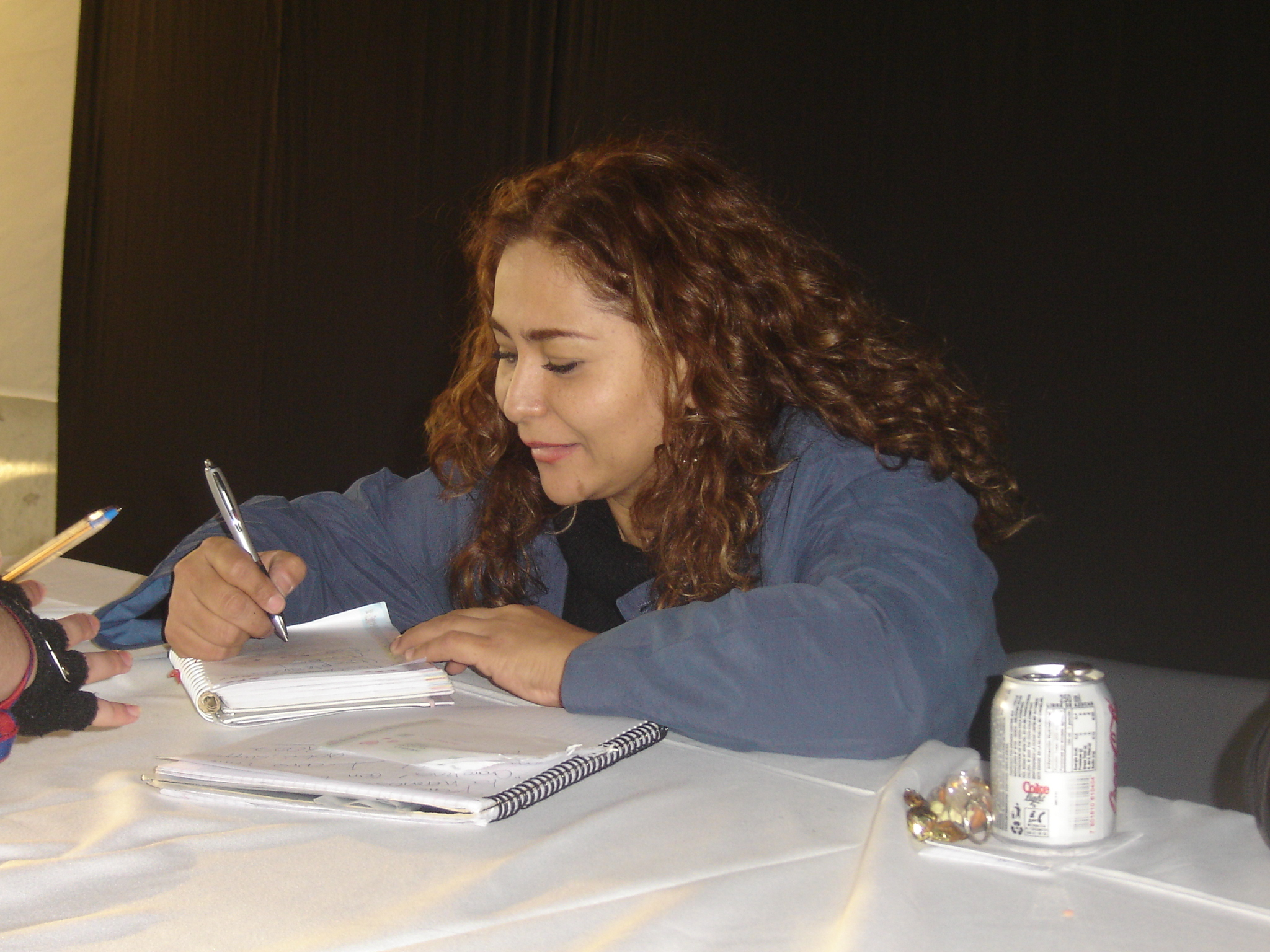 Laura Torres, doppiatrice messicana